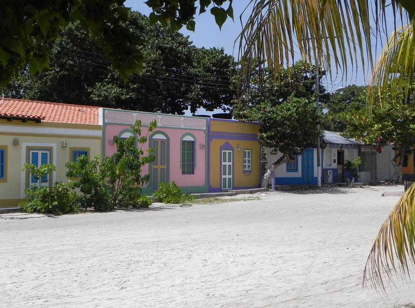 Calles de Arena, Los Roques Venezuela